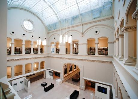 Wetenschappelijke Bibliotheek van de Nationale Bank van België